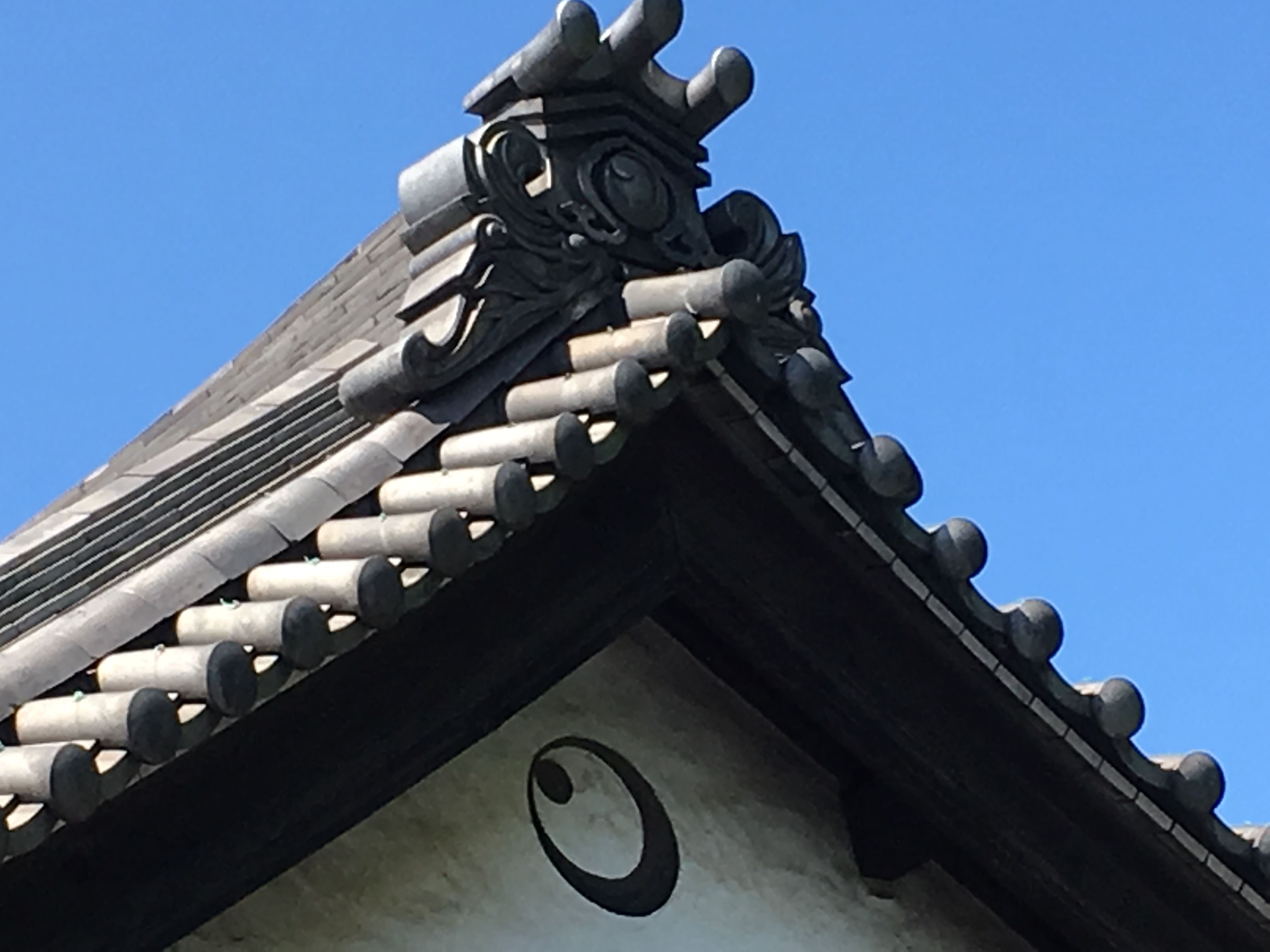 胤重寺の本堂の屋根側面